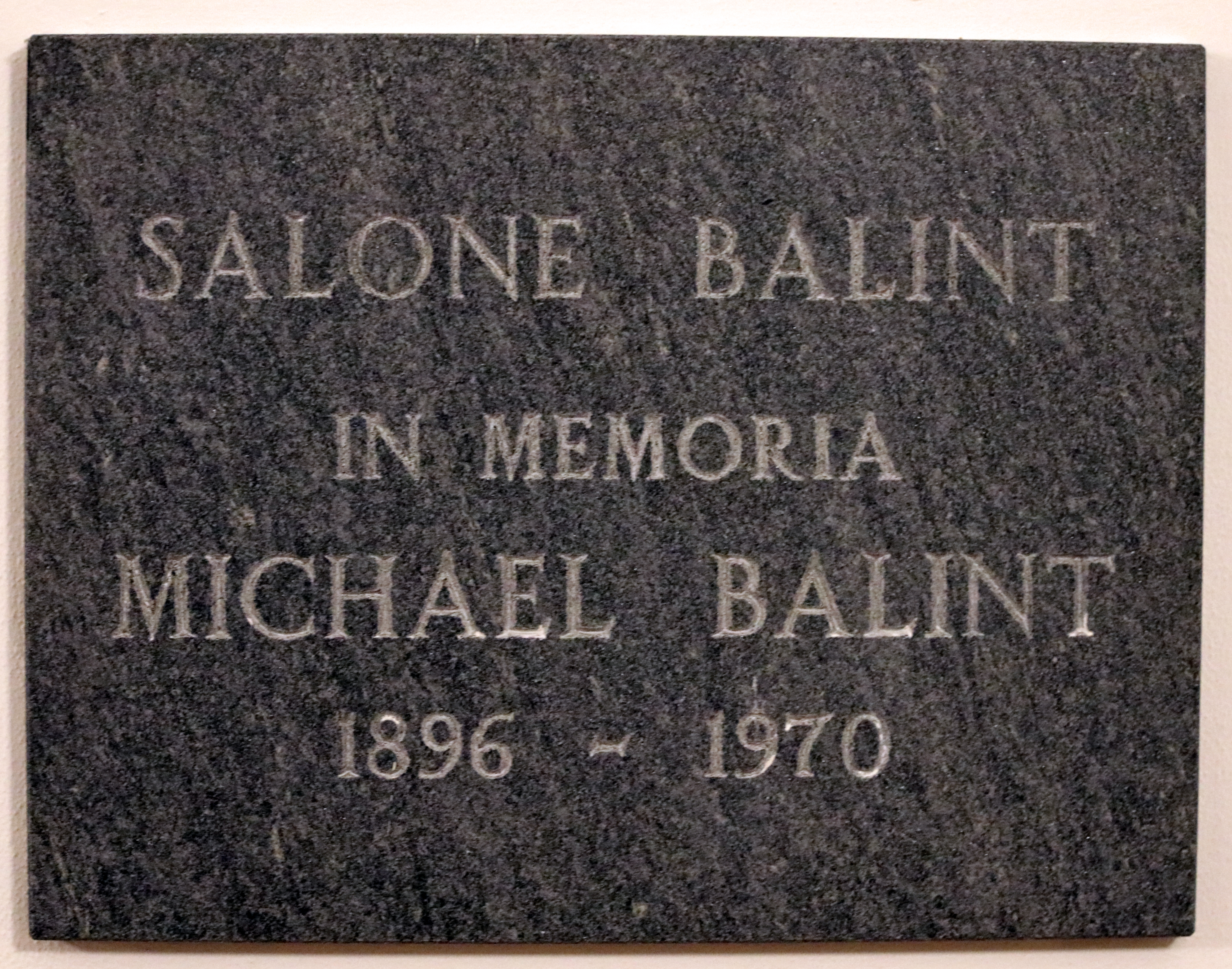 Die Gedenktafen an Michael Balint auf dem Monte Verità.